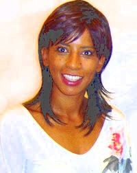 Bildbeschreibung: Arabella Kiesbauer Fotograf: Florens Eblinger (reg. Florens Eblinger) Datum: 26. November 2004 Sonstiges: Kiesbauer bei Adventfeier 2004 Version: keine weitere